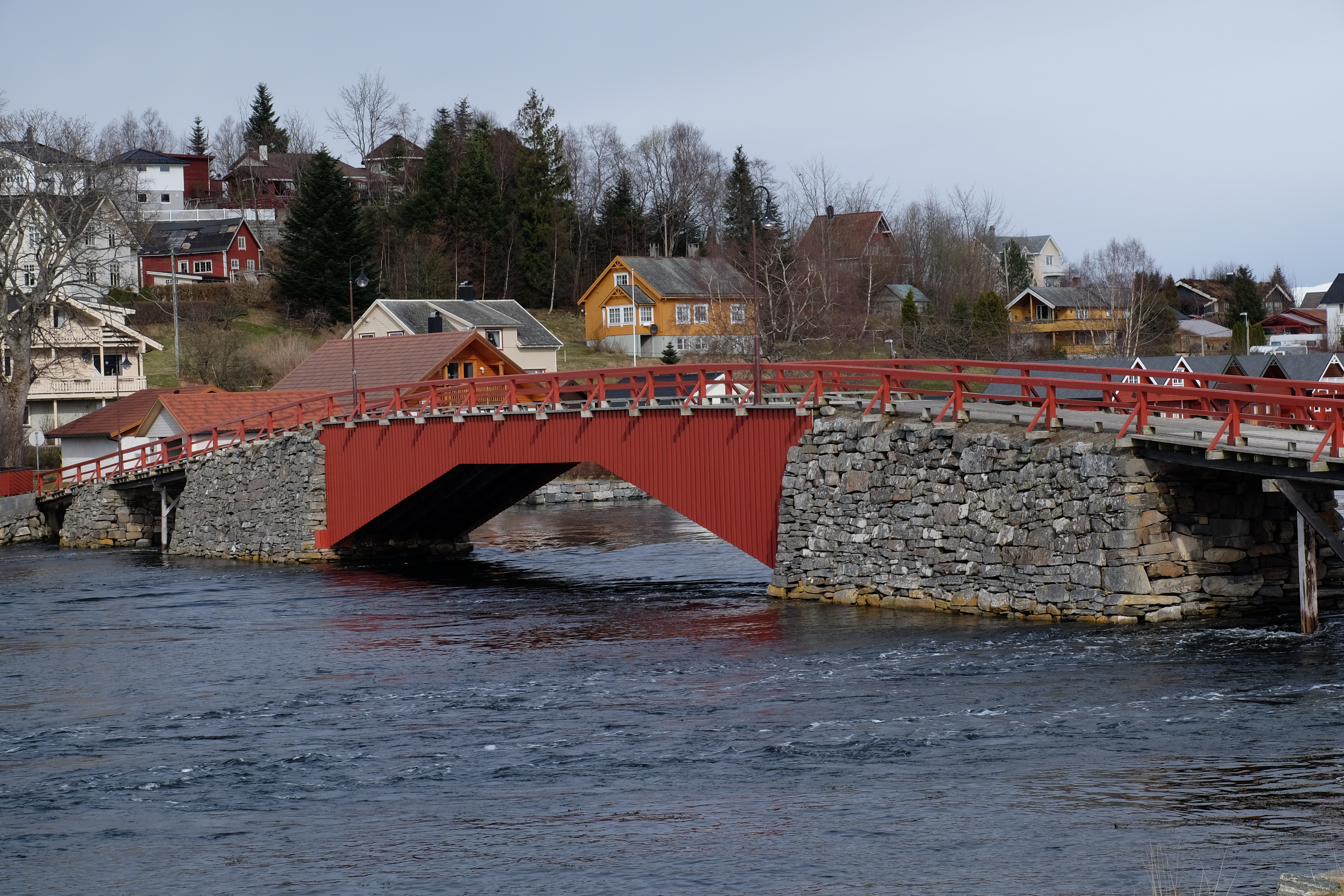 2016-03-24 Helland (19)